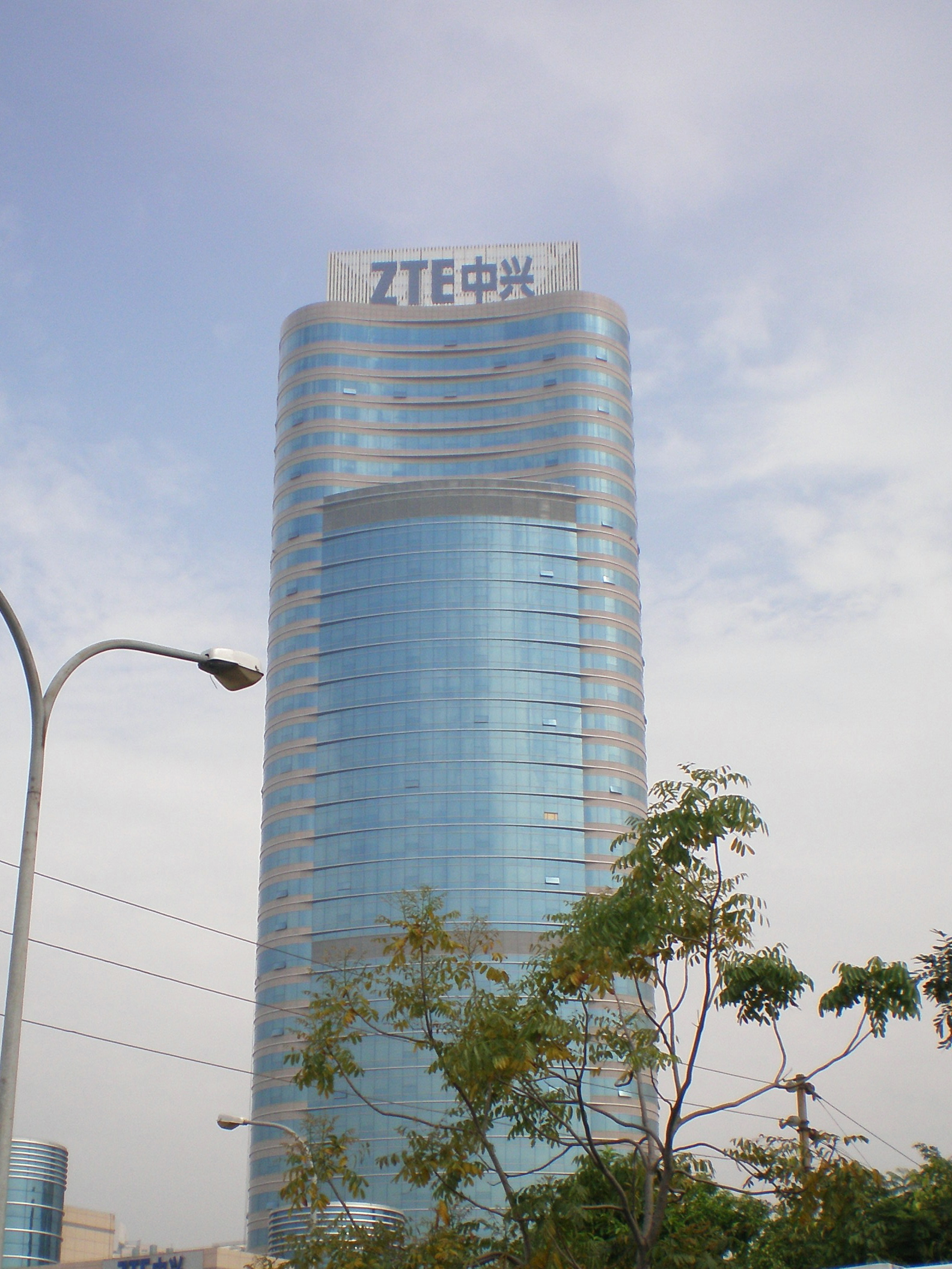 中文（中国大陆）: 中兴总部大厦